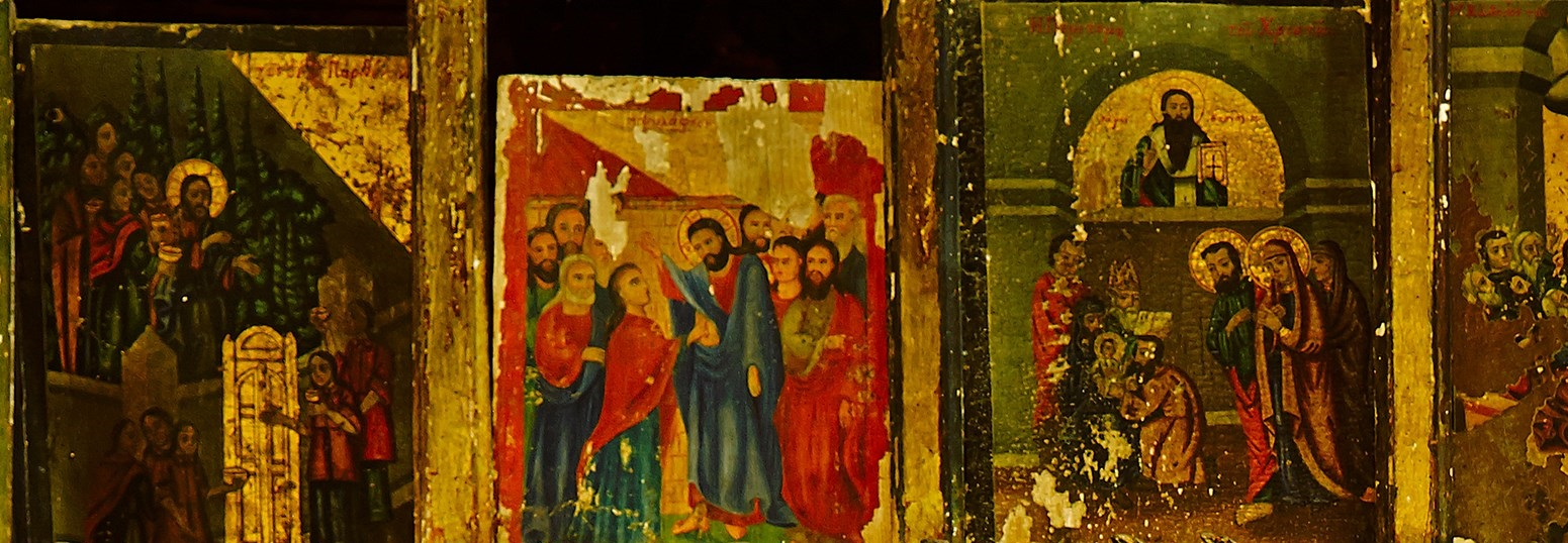 Царски икони от църквата "Свети Георги" в Янешево, Кукушко